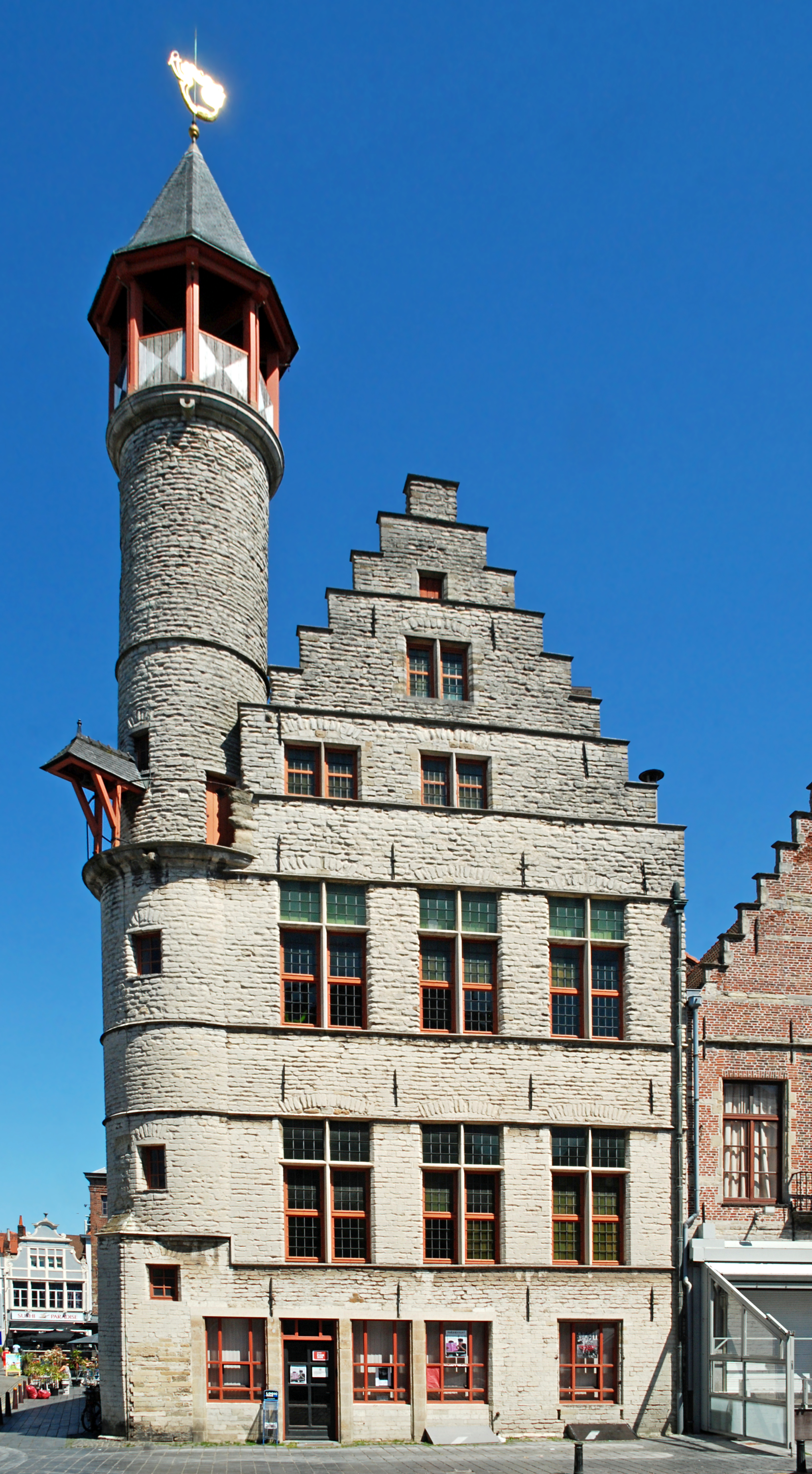 Belgique - Gand - Maison de la Corporation des Tanneurs - Het Toreken (gothique 1451-1483)